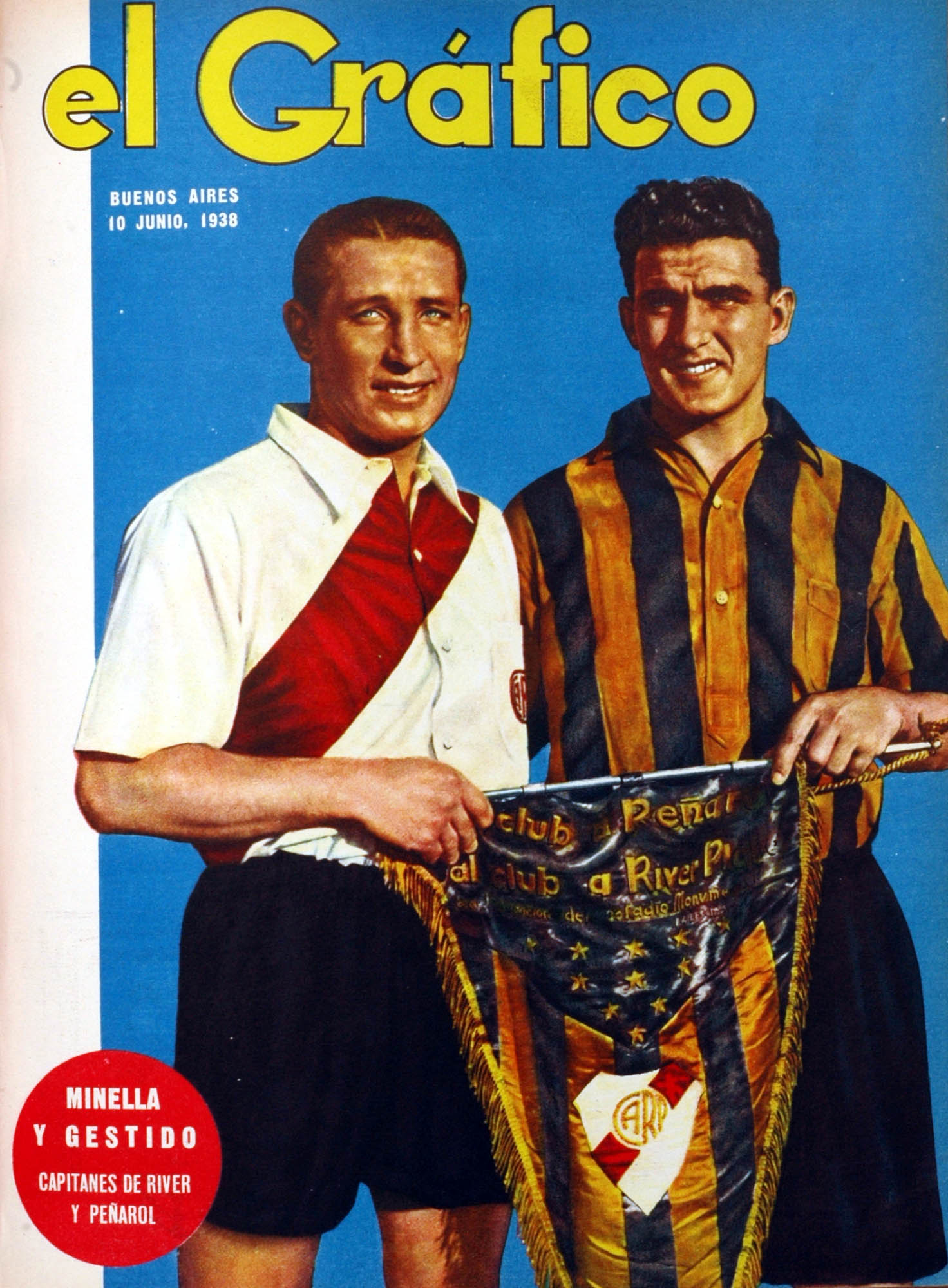 El Grafico del 10 de Junio de 1938. Edicion 987